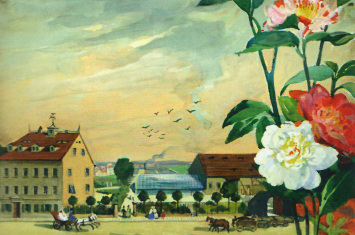 Seidelsche Gärtnerei mit "Prachtglashaus", Äußere Rampische Gasse Dresden, 19. Jahrhundert